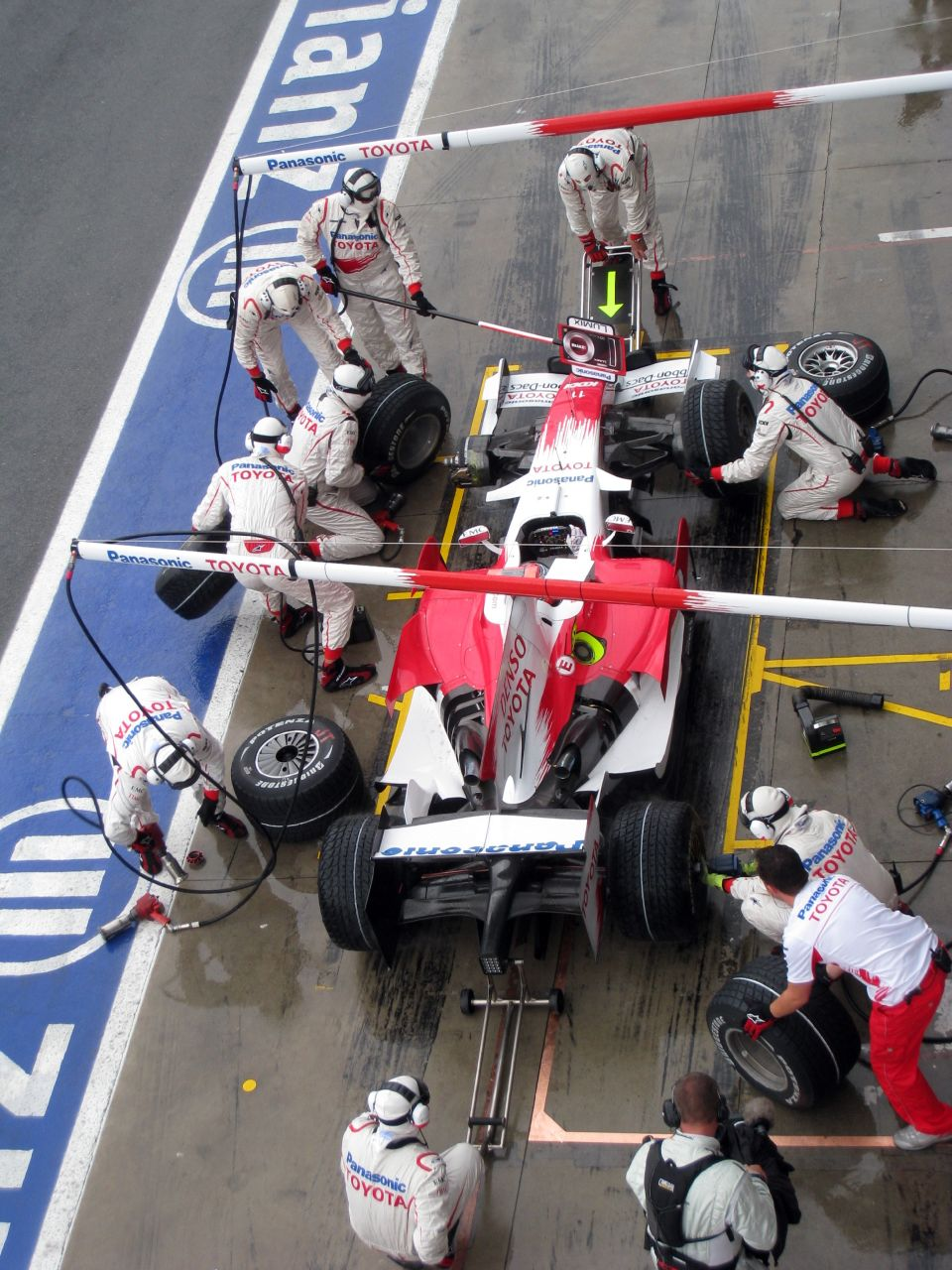 Toyota pit stop Monza 2008